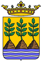 este es el actual escudo